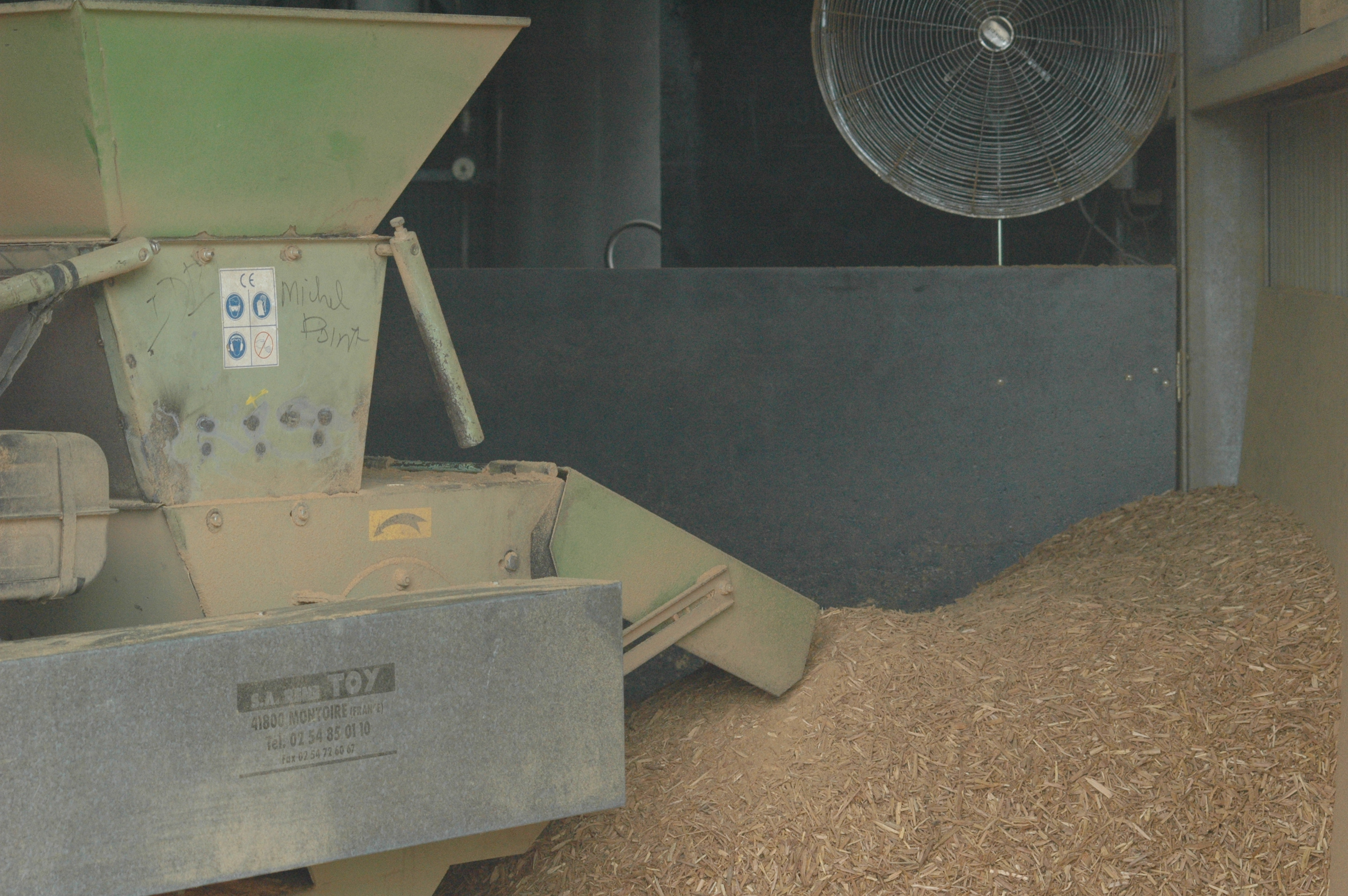 Copeaux de bois de santal prédéstinés à la distillation, Egypte.